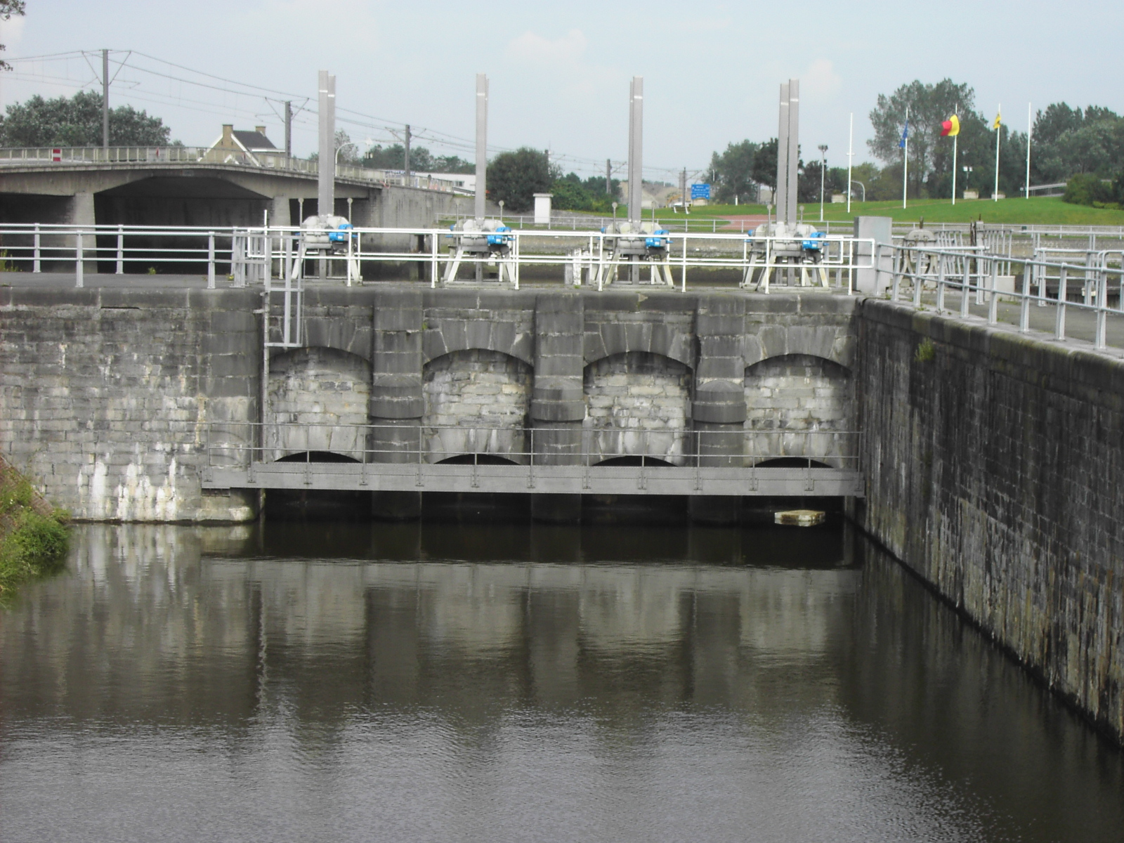 De vier verlaten of overlaten van de Veurnesluis